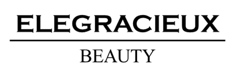 This is a Logo of Elegracieux Beauty.